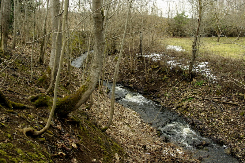 Orasoja kanjon.